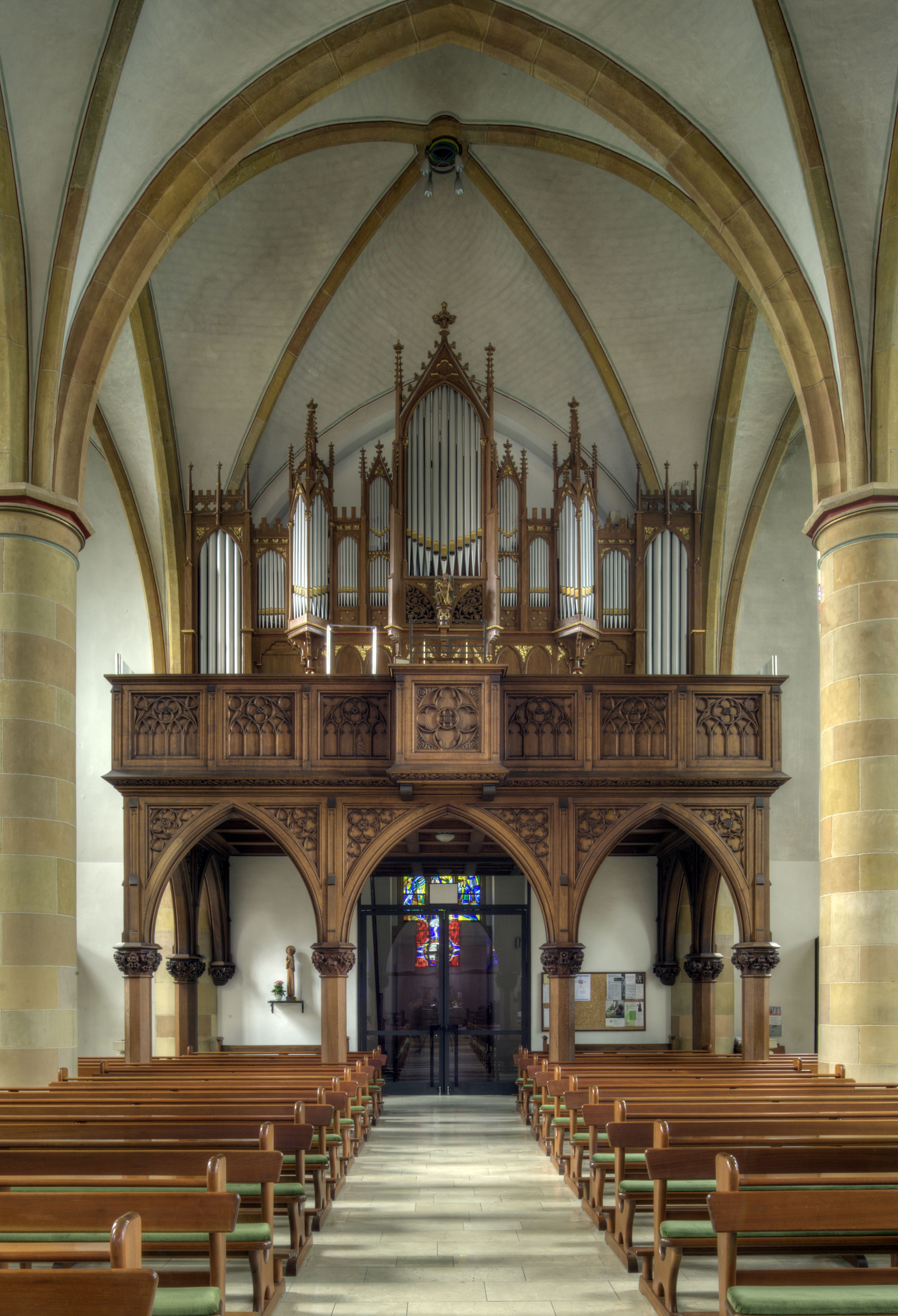 Feith-Orgel, Ennigerloh-Ostenfelde